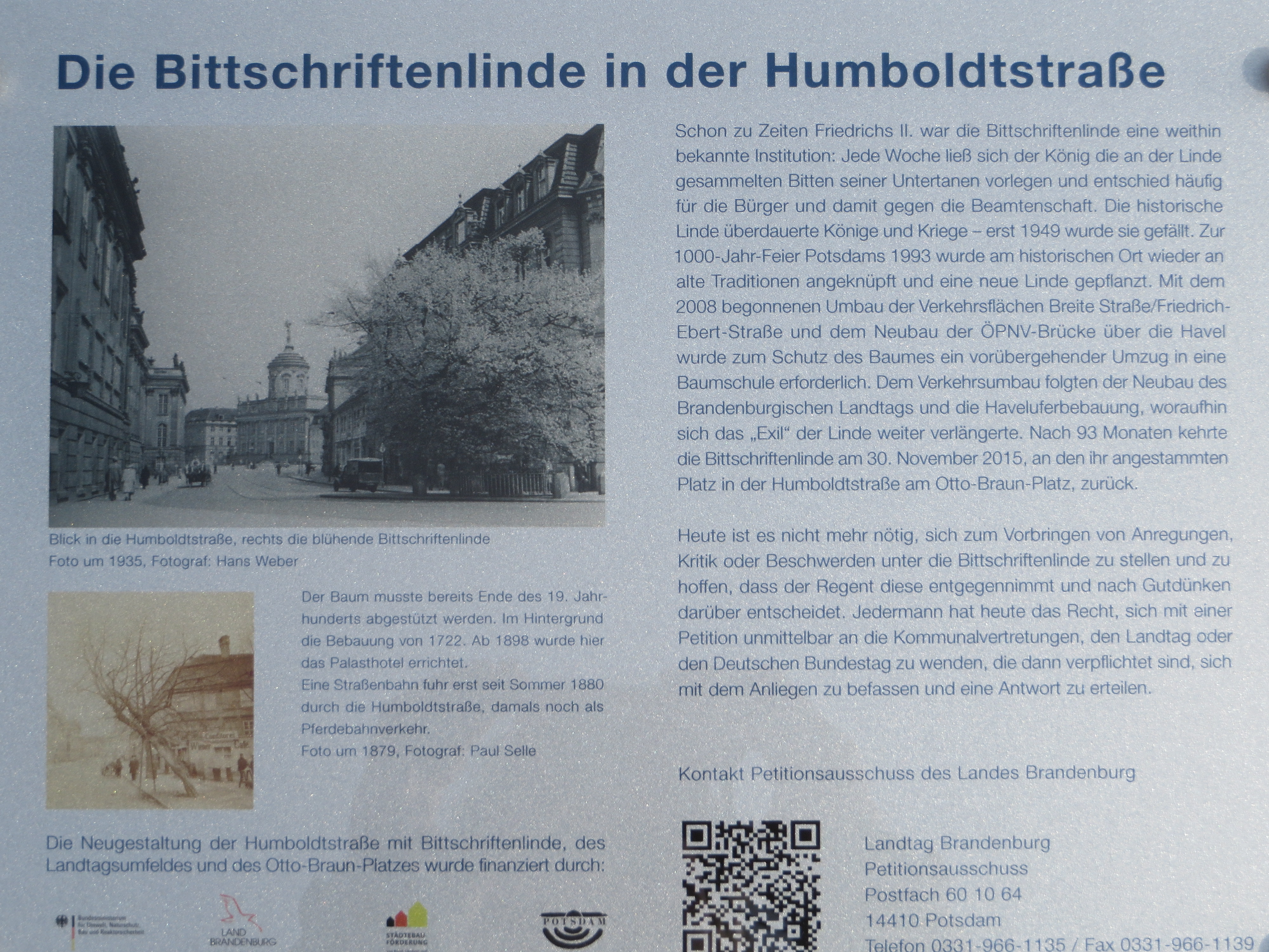 Hinweistafel Bittschriftenlinde, Potsdam 03/2017